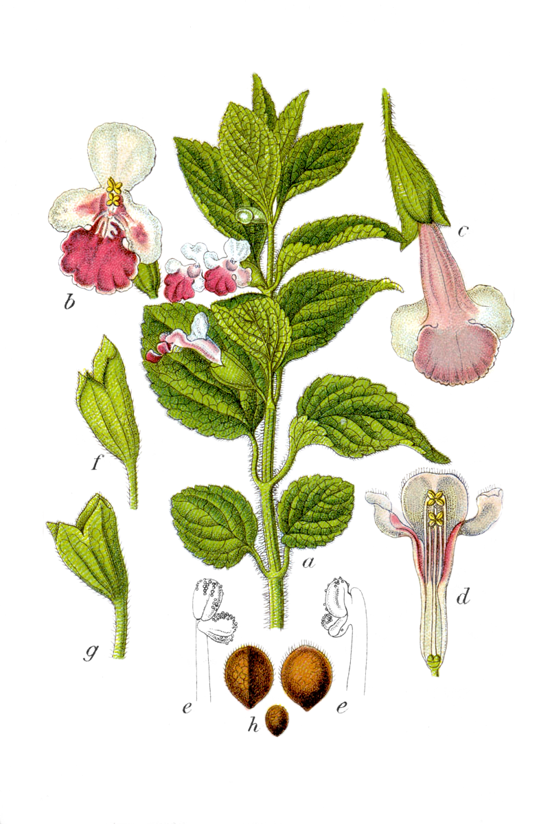 Melittis melissophyllum L. Original Caption Bergmelisse, Melittis melissophyllum